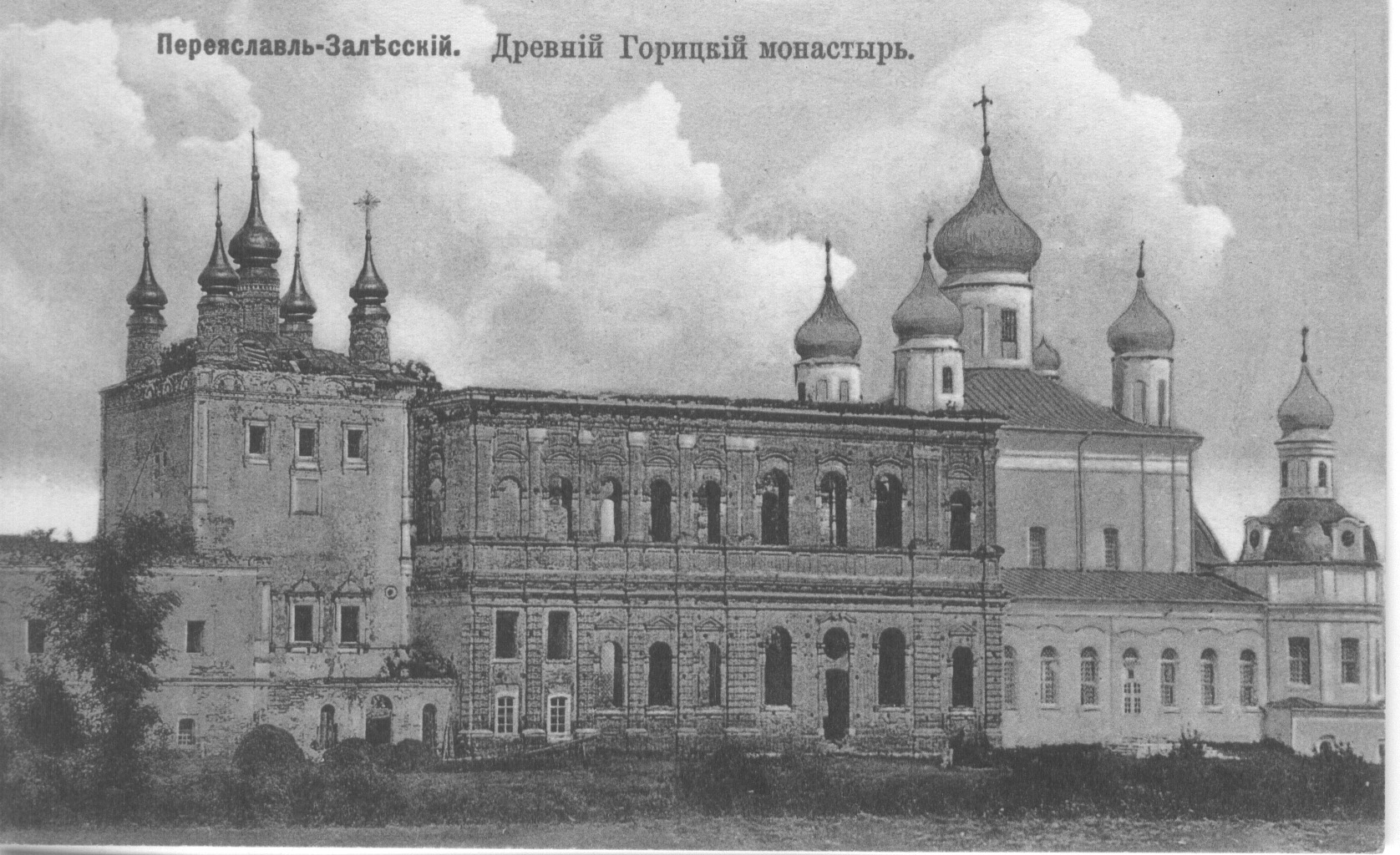 Церковь Гефсимания в Горицком монастыре близ Переславля